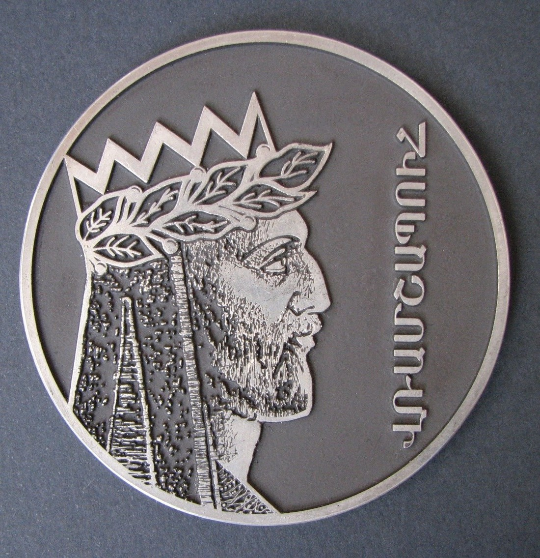 VRAMSHAPUH